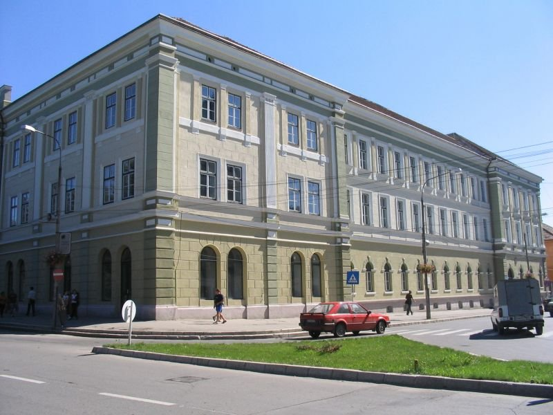 Székely Mikó Kollegium épülete, Sepsiszentgyörgy